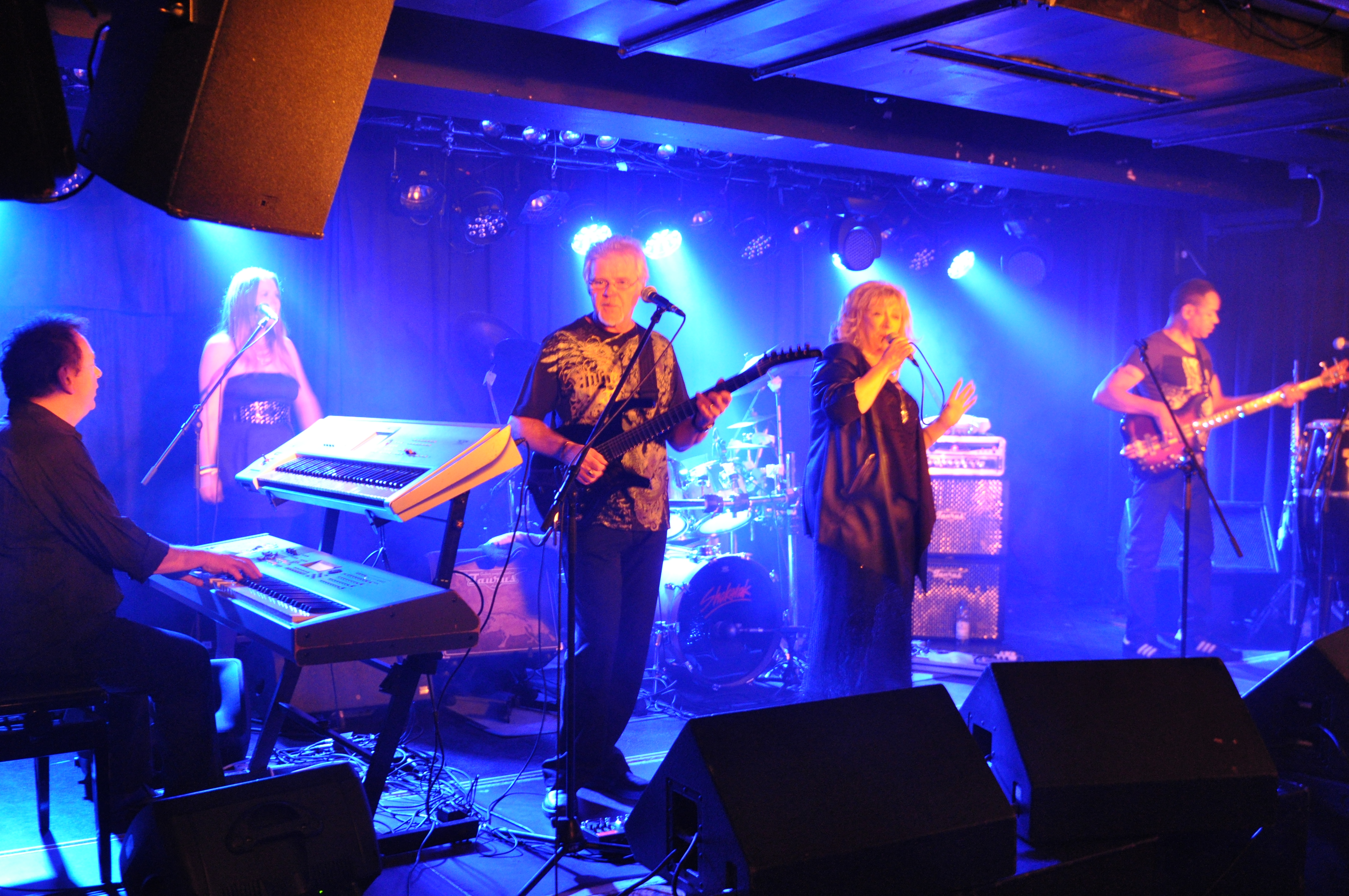 Shakatak am 19. September 2014 im Live Club Barmen in Wuppertal